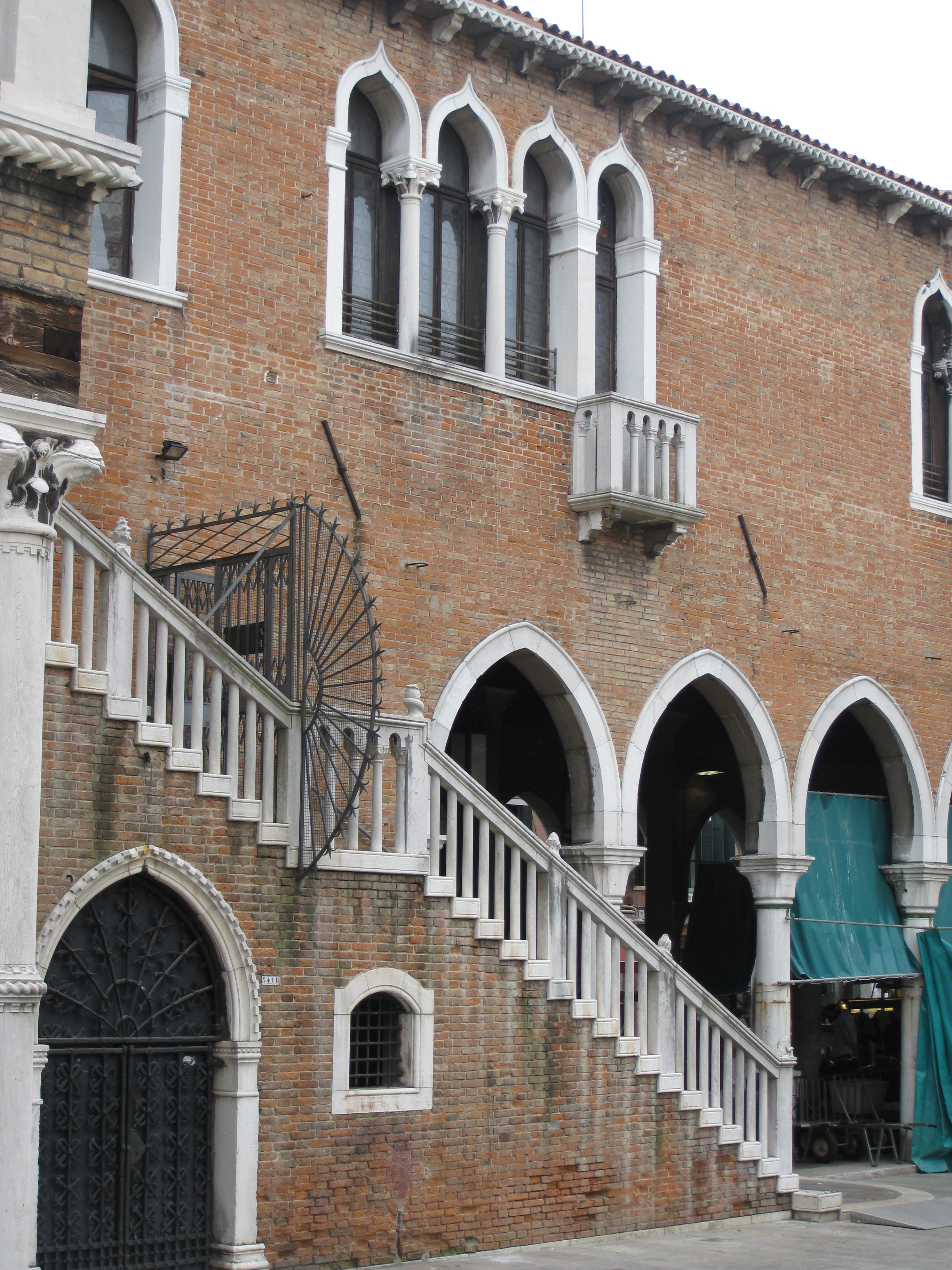 Campo della Pescaria שוק הירקות והדגים של ונציה